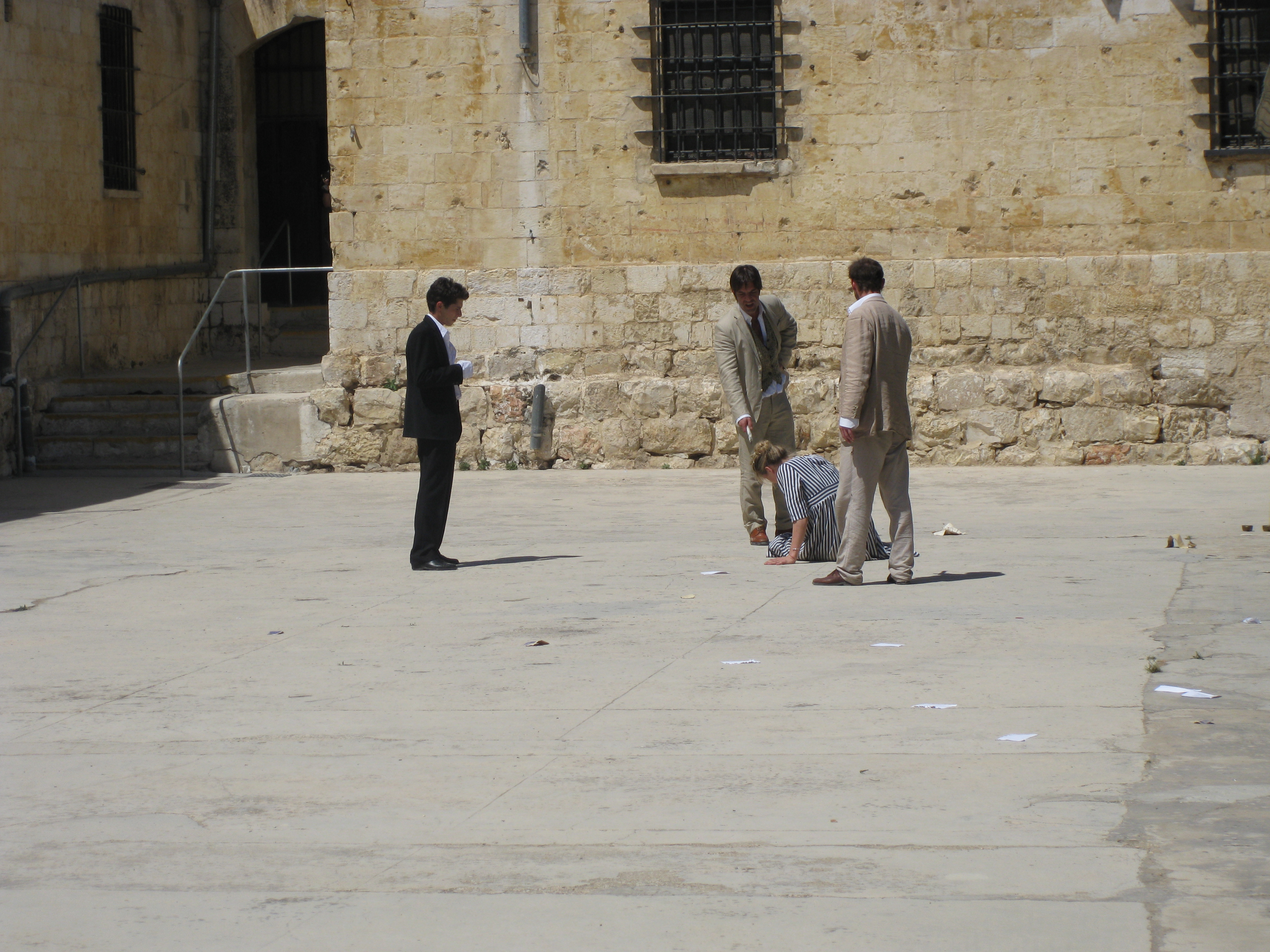 Museum of the Underground Prisoners Rehearsals for the play Alma played at the museum מוזיאון אסירי המחתרות חזרות לקראת עבור המחזה אלמה של תאטרון הקאמרי